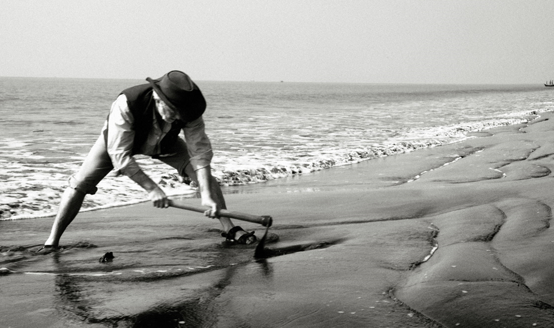 Yves, chef de projet de l'excavation de l'épave de Kuakata